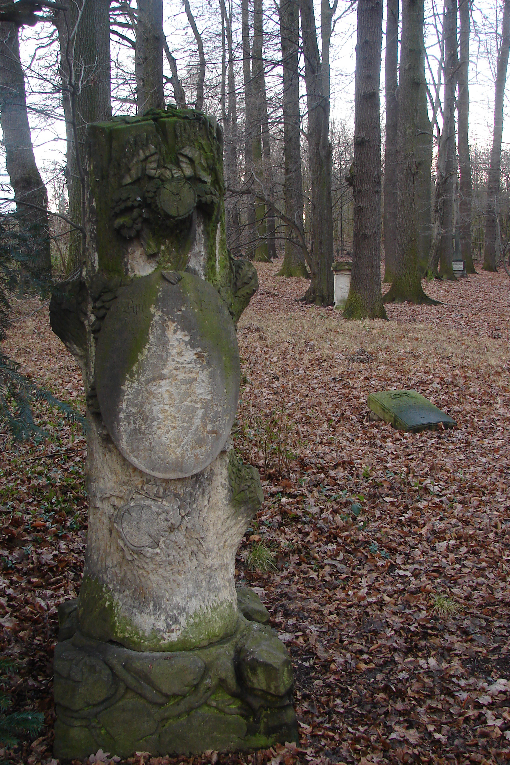 Ullersdorfer Försterhain, Grabsteine von Förstern aus Ullersdorf, Dresdner Heide